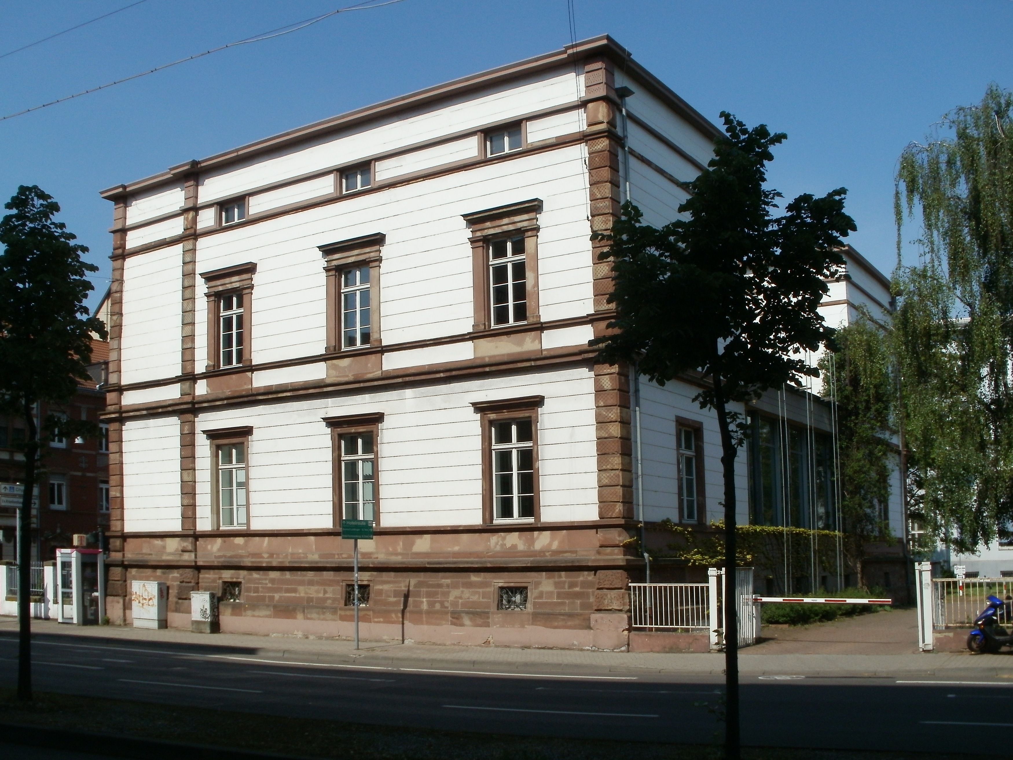 Paul-Marien-Stift (Saarbrücken)